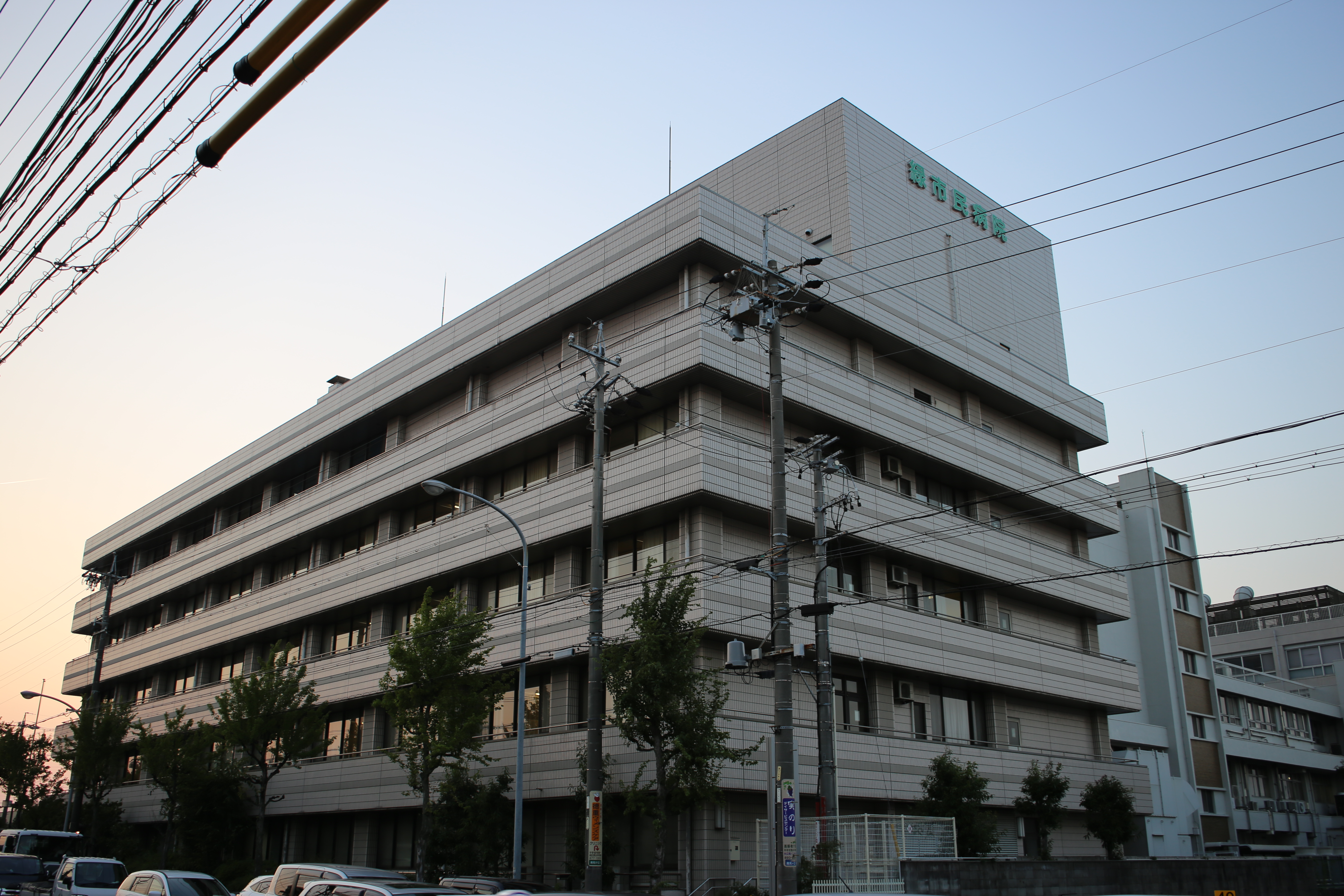 名古屋市緑区潮見が丘一丁目の名古屋市立緑市民病院を南側公道東側より撮影